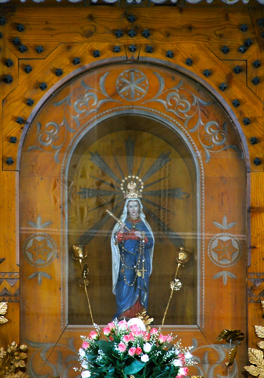 Sanktuarium_Maryjne_na_Wiktorówkach, figurka MB Jaworzyńskiej